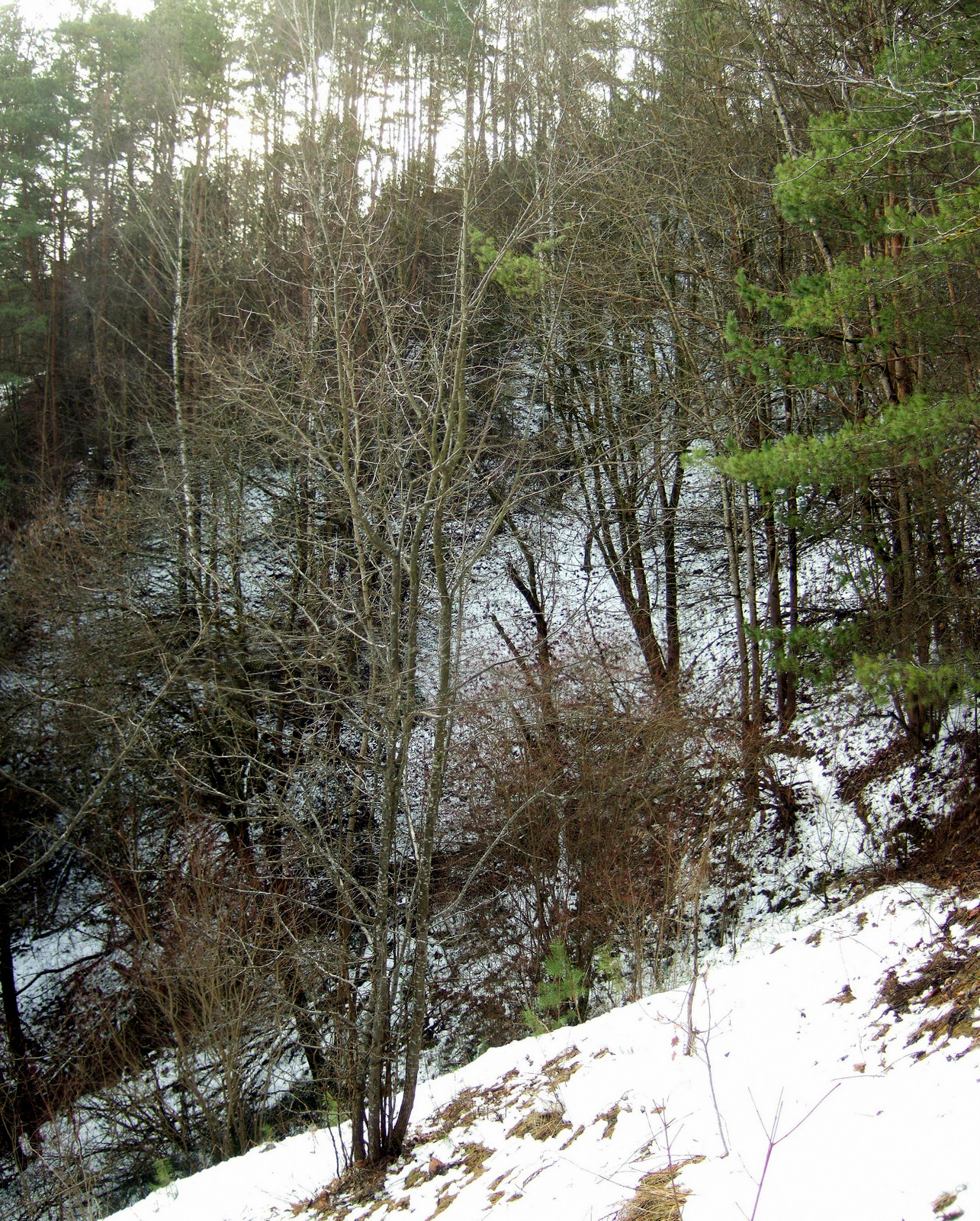 Gariūnų sufozinio cirko šlaitai.